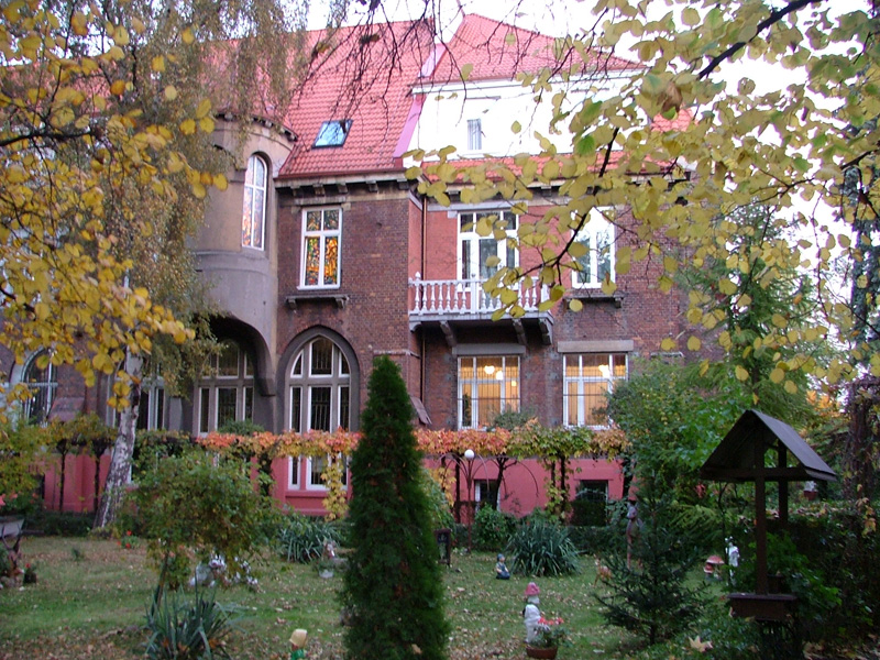 PL Warsaw, Poland, Orioniści, ul Barska 4